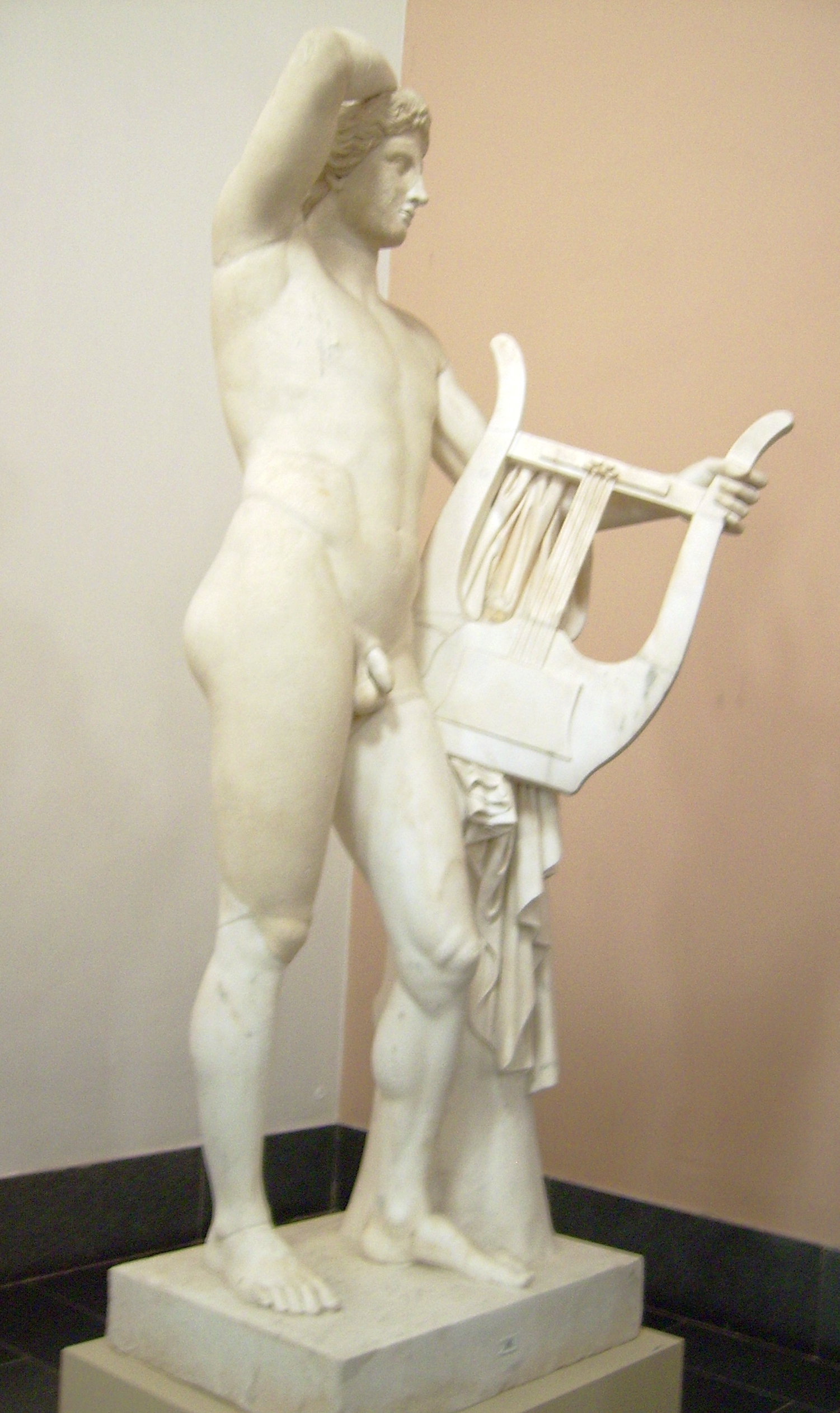 Apollo Kitharoidos, Marmorstatue, wohl im 2. Jahrhundert in Rom gefertigt, um 1766 von Bartolomeo Cavaceppi restauriert, danach durch Agenten von Friedrichs des Großen erworben, Höhe 213 cm, Sk 44